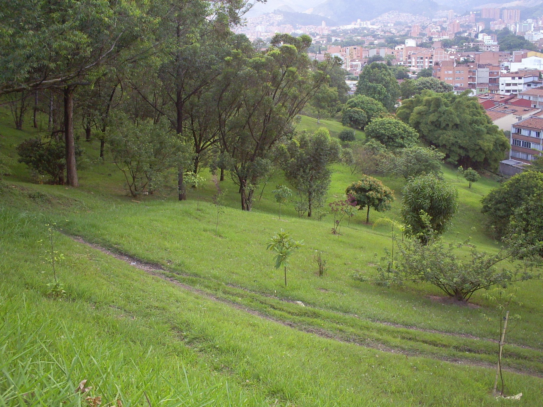 Cerro Nutibara, Medellín, Colombia.